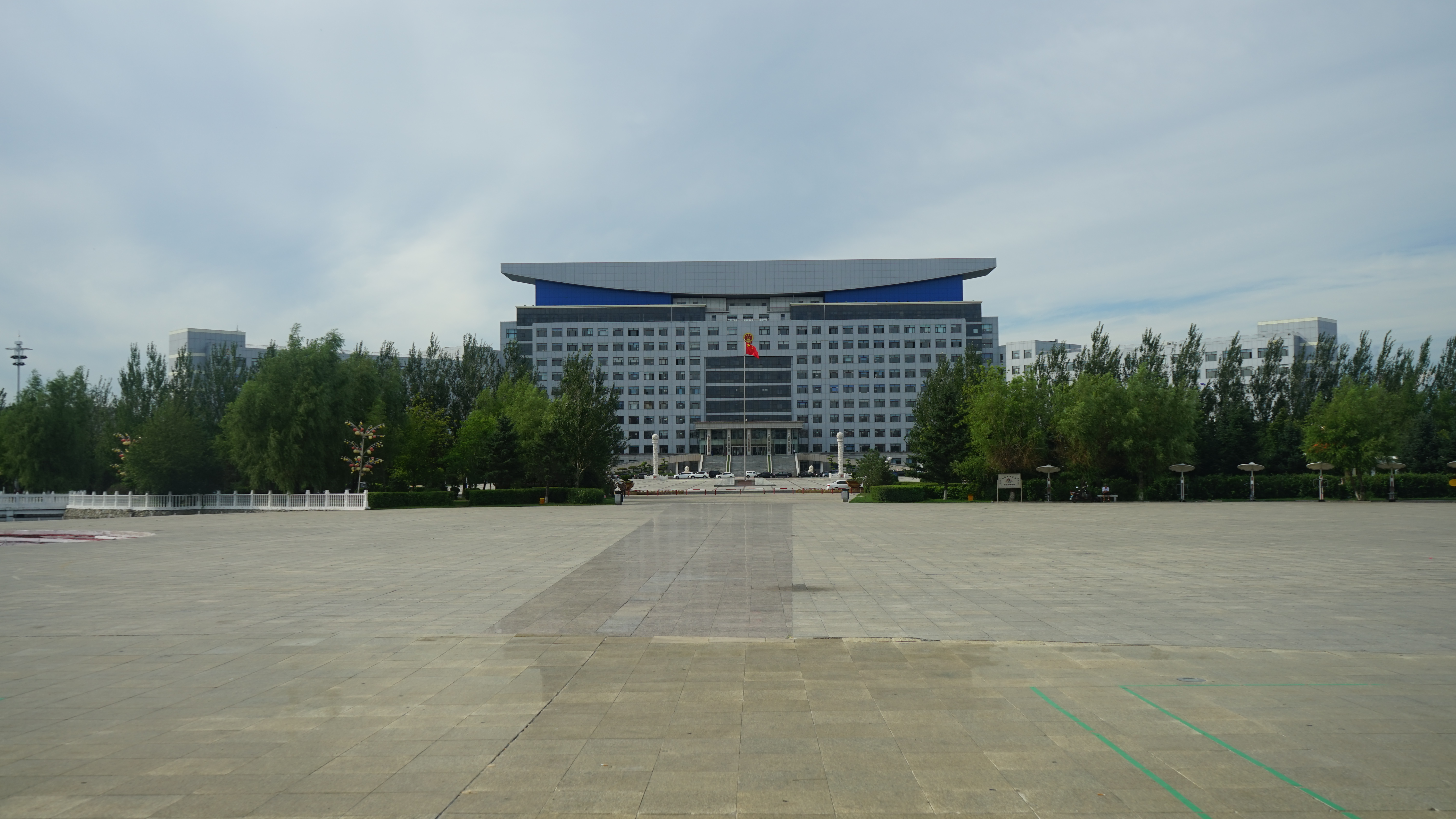 绥化市人民广场，后面的大楼为绥化市人民政府大楼